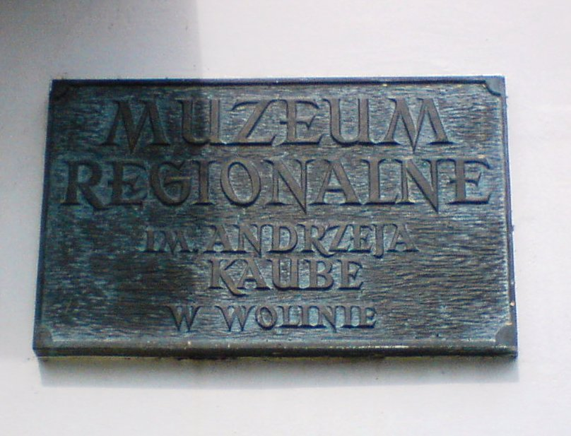 tablica informacyjna